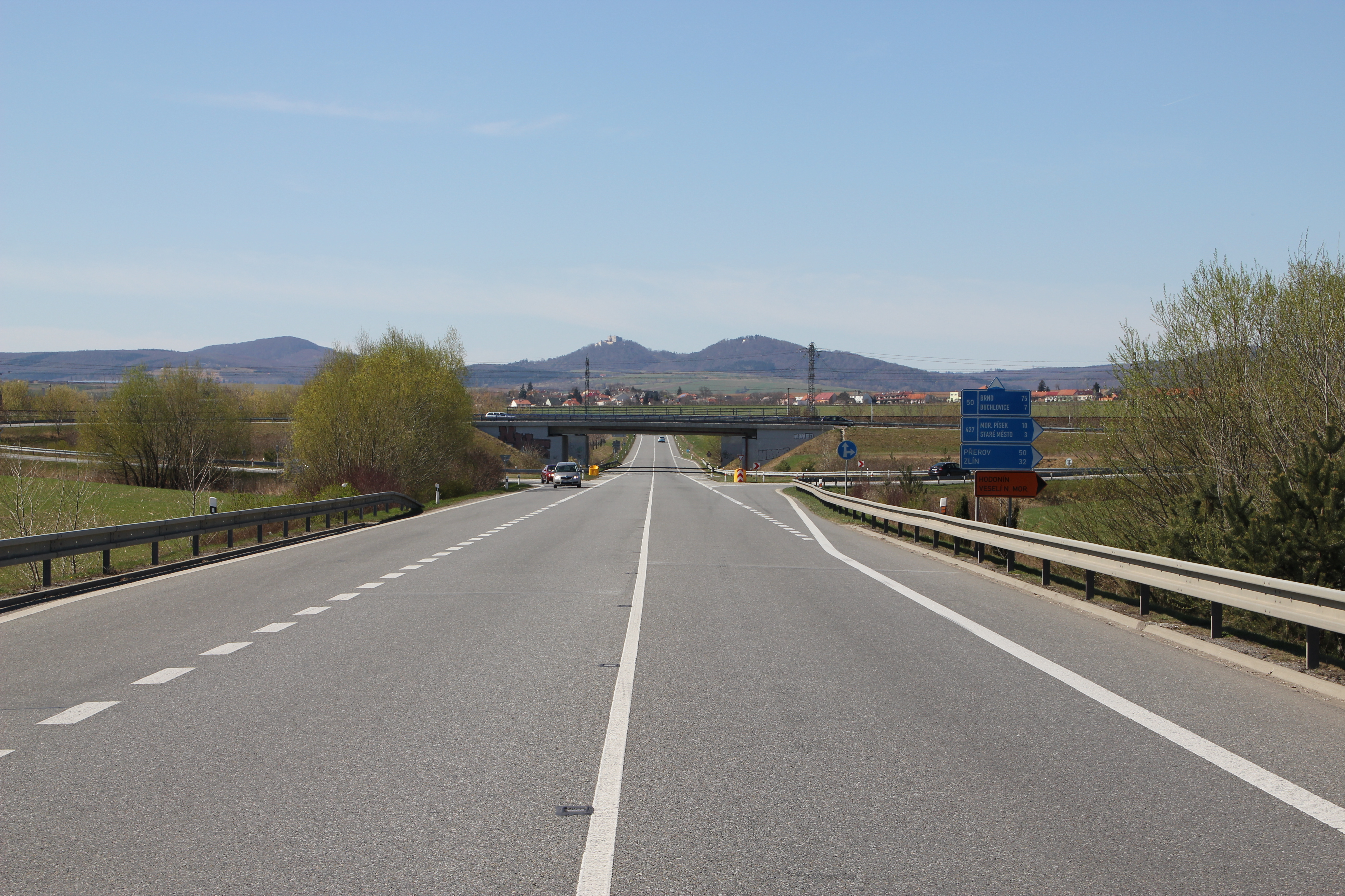 Silnice I/50 v úseku obchvat Uherského Hradiště mezi obcemi Staré Město a Kostelany nad Moravou: podjezd pod železničním mostem trati č. 330 Přerov - Břeclav a deltovitá mimoúrovňová křižovatka se silnicí II/427. V pozadí panorama Chřibů s vrchy Holý kopec, Buchlov a Modla.